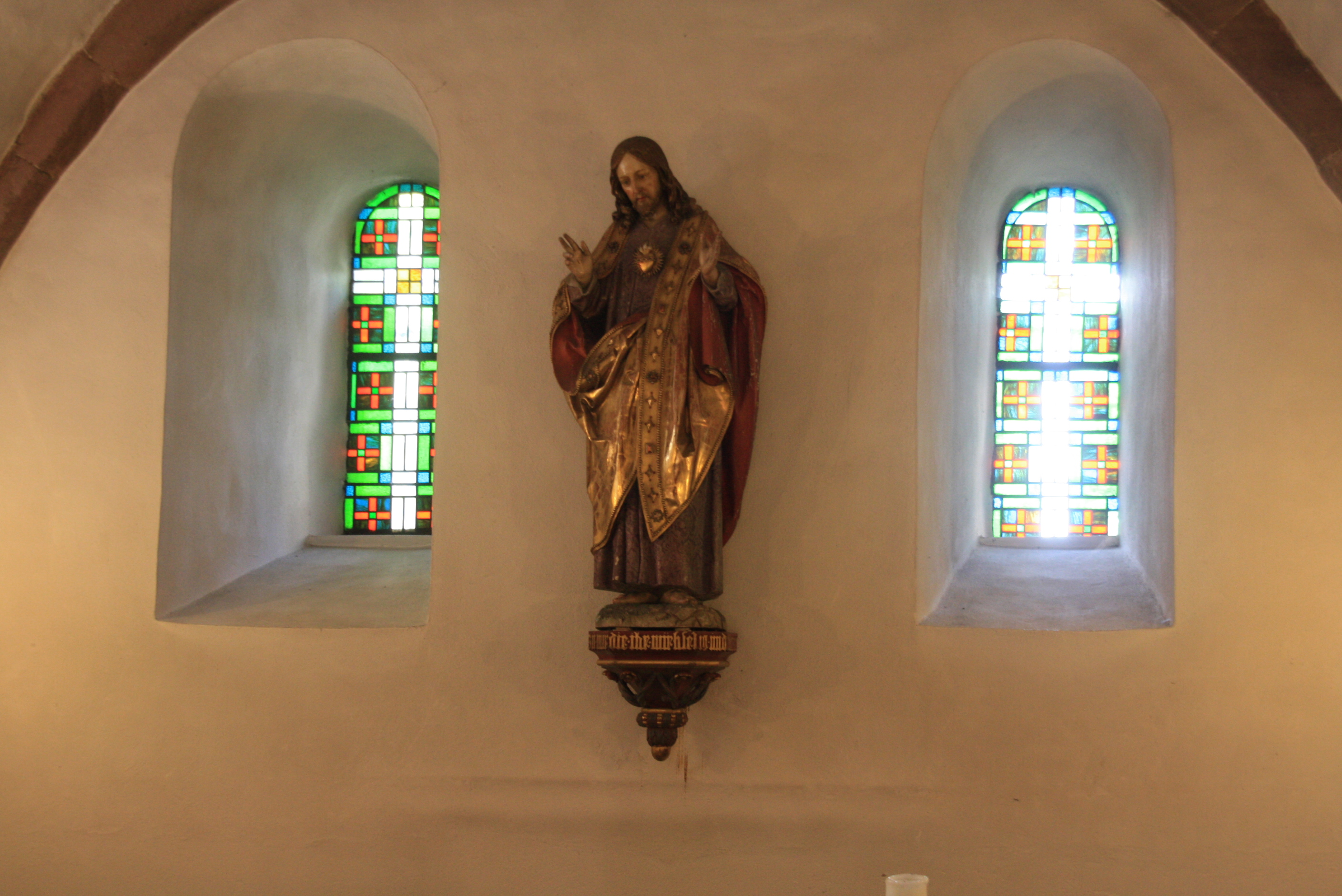 Die Kirche St. Vikor in Hochkirchen